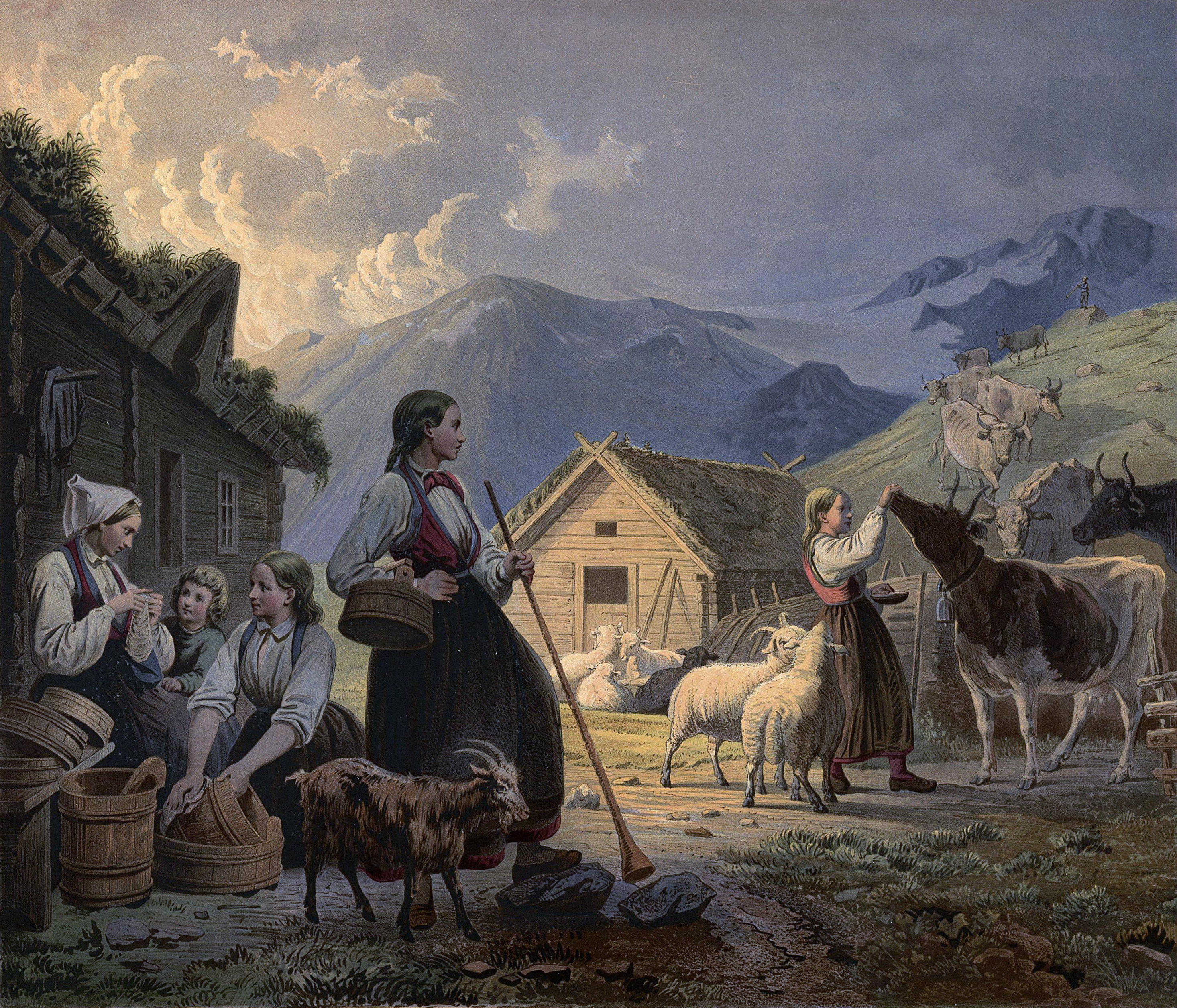 Litografi af Winckelmann & Sönner i Berlin